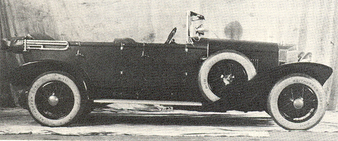 Steyr VI Sport Tourenwagen (1928)